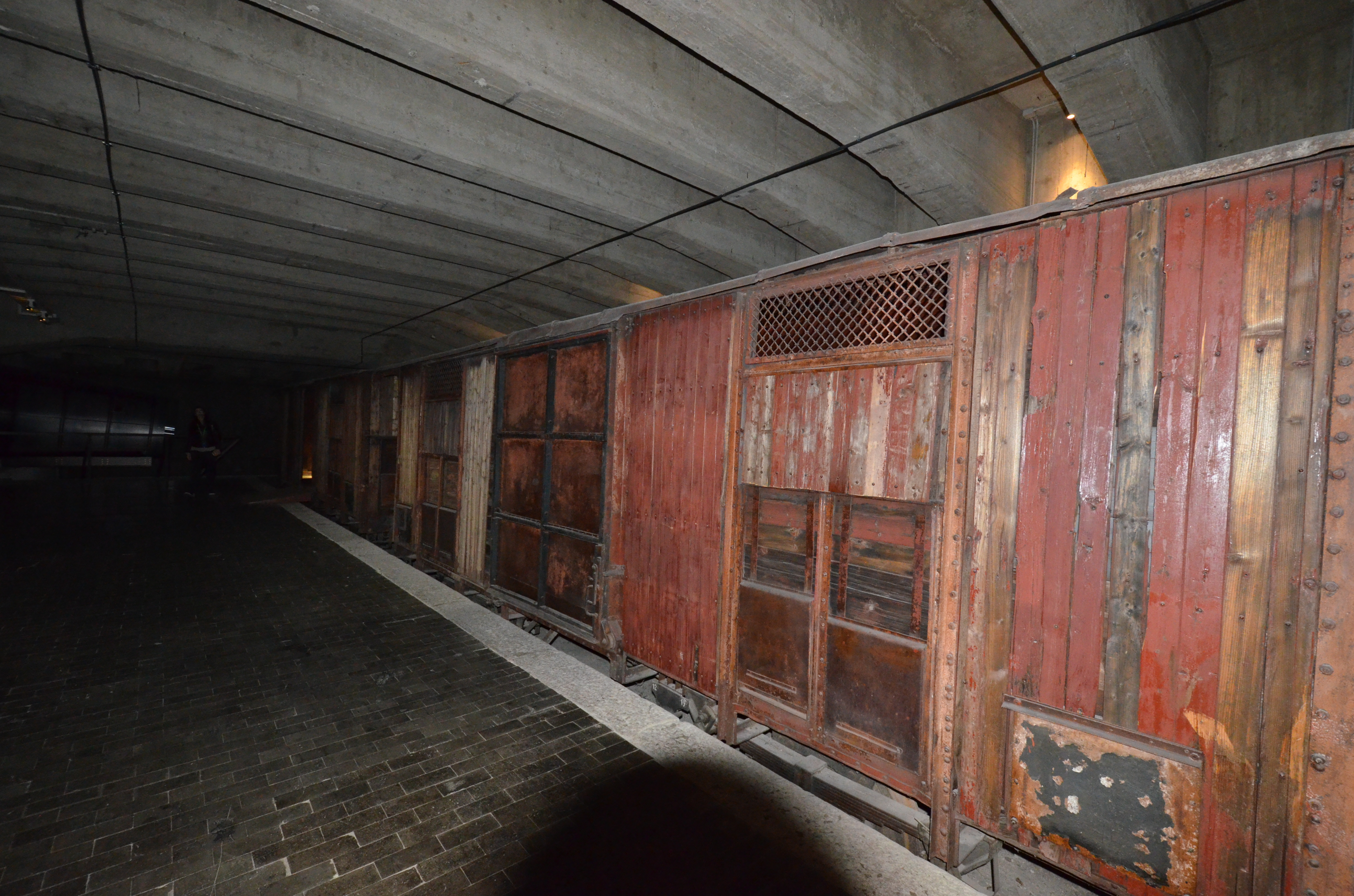 הקרון שהוביל יהודים למחנות הריכוז וההשמדה